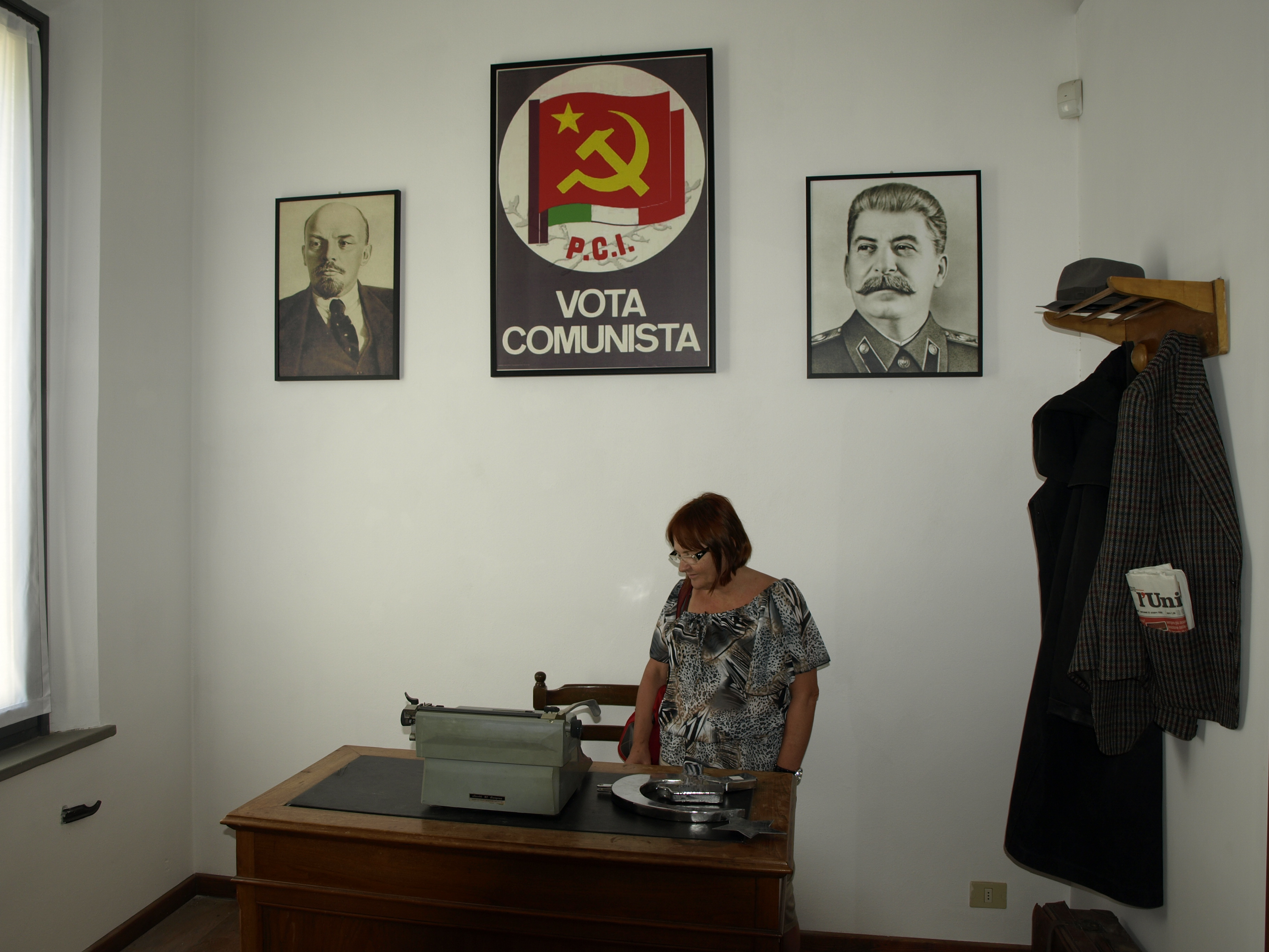 nel museo dei reperti cinematografici dei films